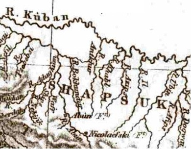 Карта Большой Шапсугии